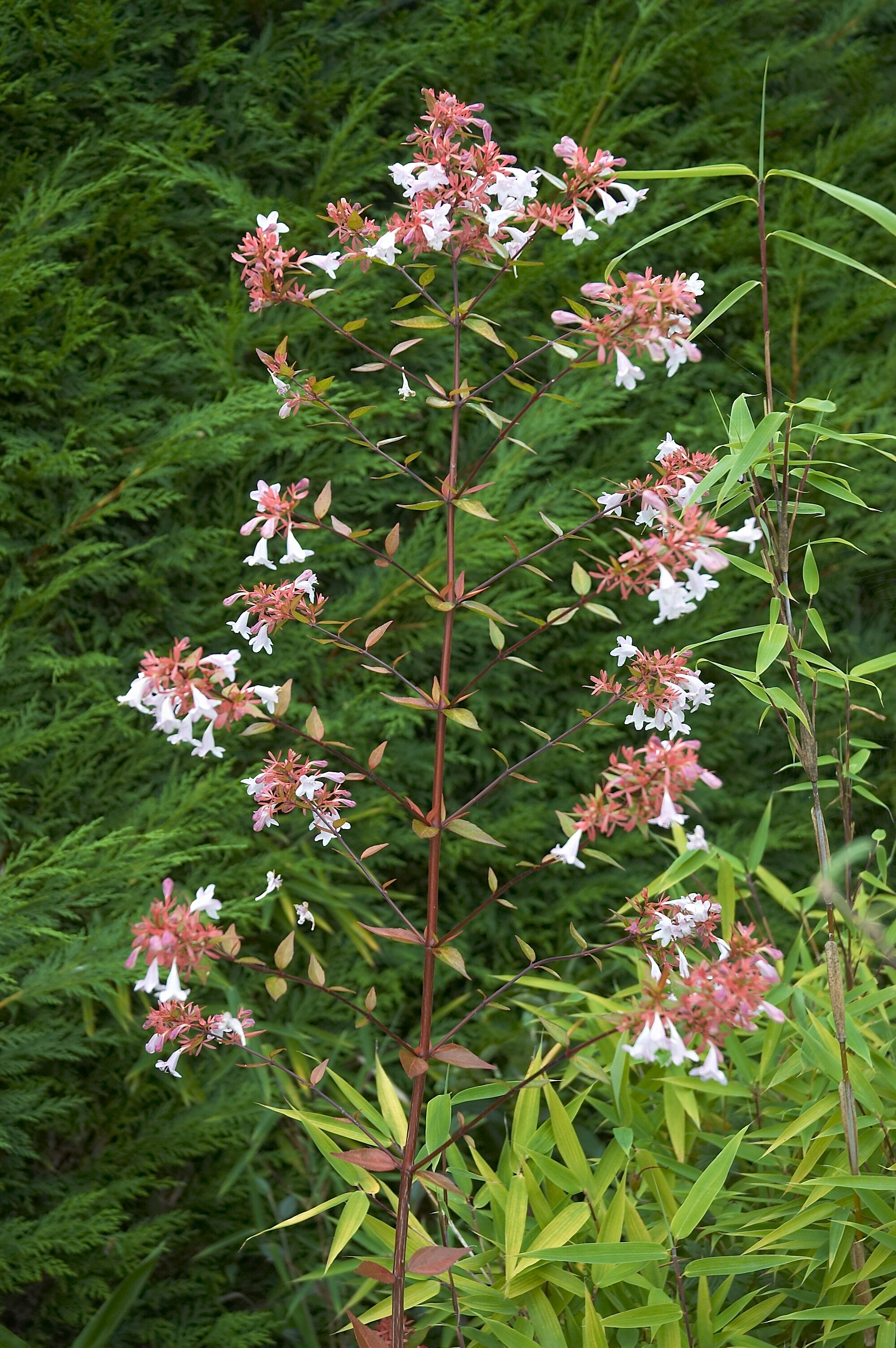 Abelia x grandiflora 'Conti'